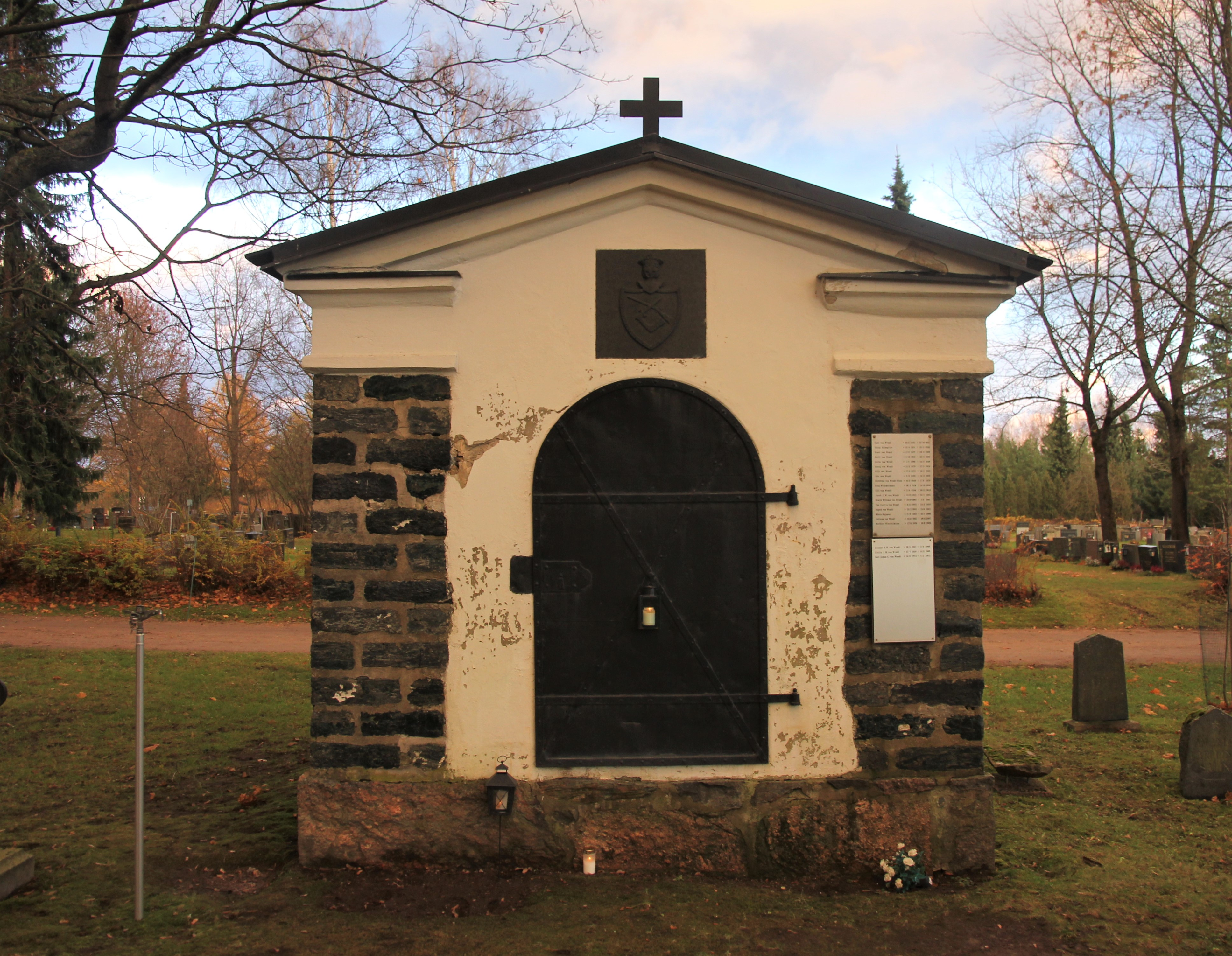 von Wendt-suvun hautakappeli 3.11.2018 eli Pyhäinpäivänä iltapäivän hämärässä, kun muutama kynttilä on jo sytytetty kappelin edustalle. Hautakappeli sijaitsee Helsingin pitäjän kirkonkylän hautausmaalla, Vantaan Helsingin pitäjän kirkonkylän kaupunginosassa.